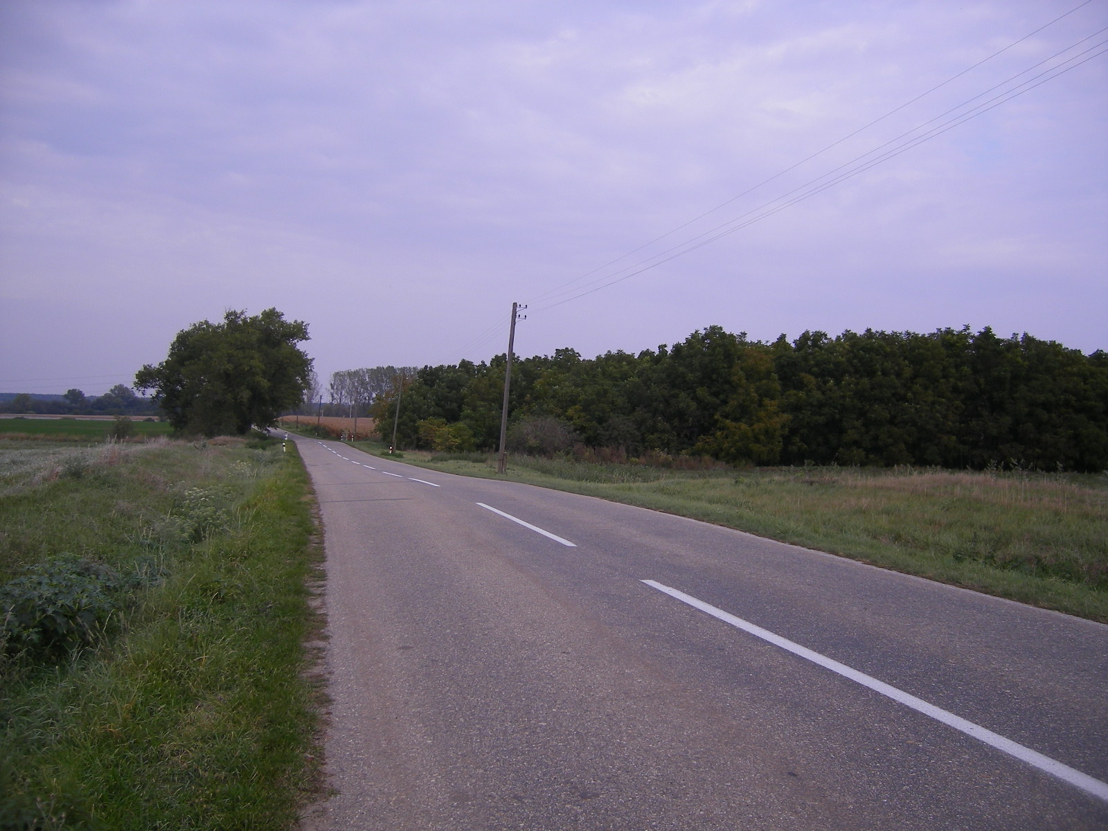 Perbete -az 589-es főút a falutól északra